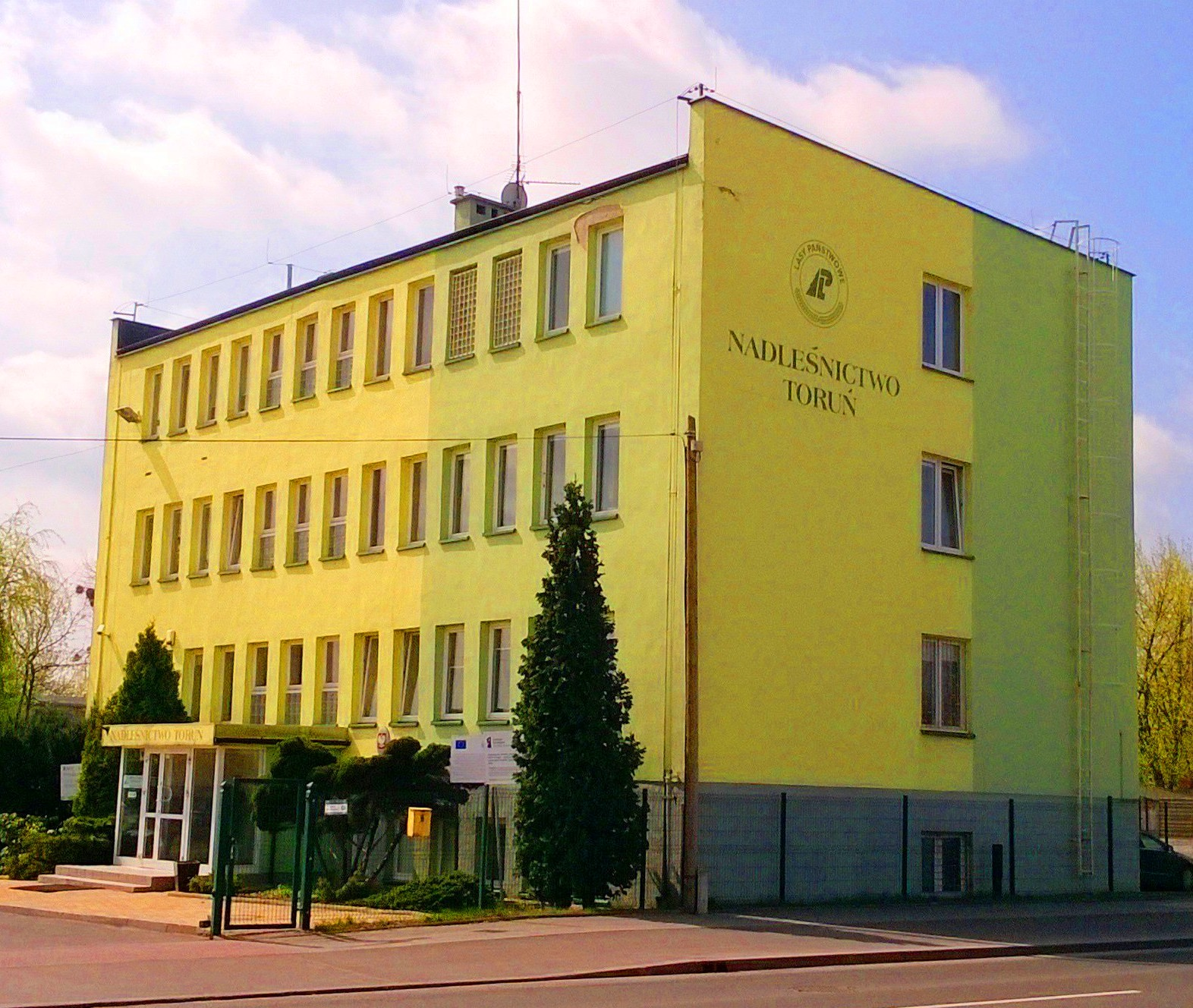 Nadleśnictwo Toruń